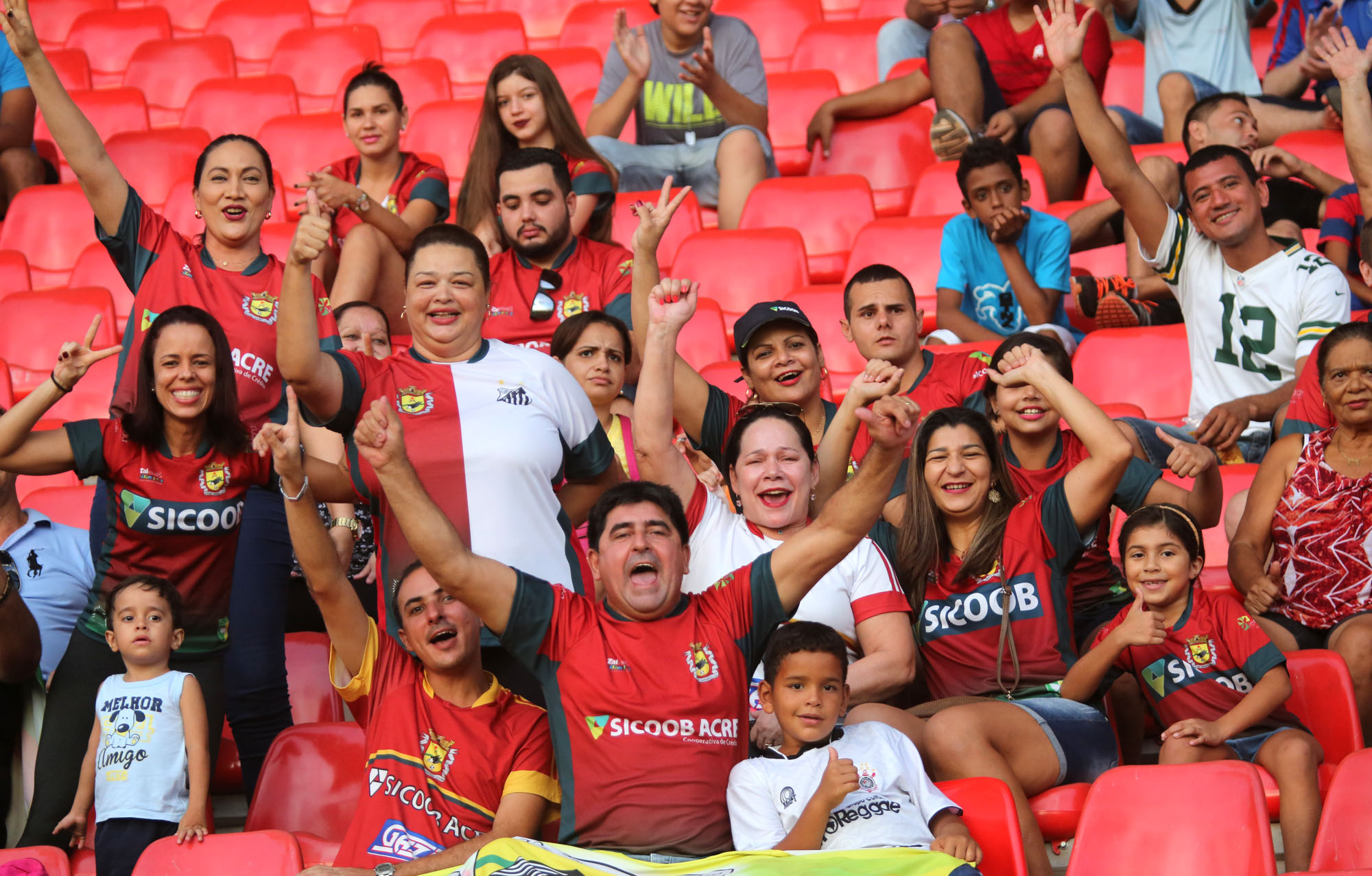 Foto: Sérgio Vale/Secom